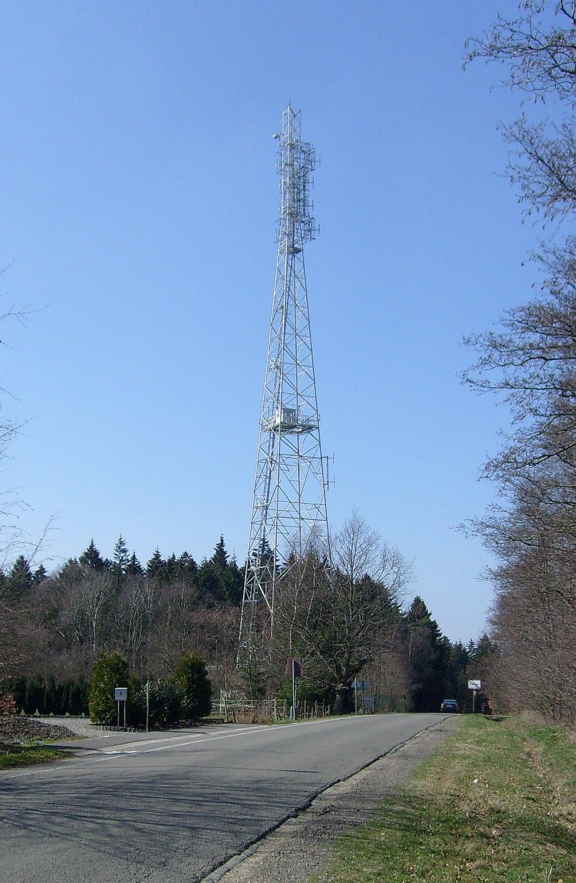 Sender Raeren-Petergensfeld